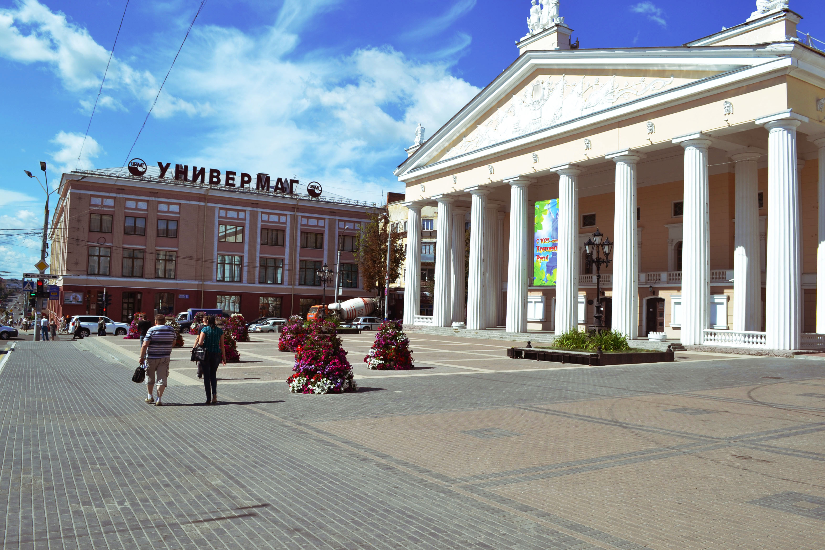 Драм. театр и театральная площадь в 2013